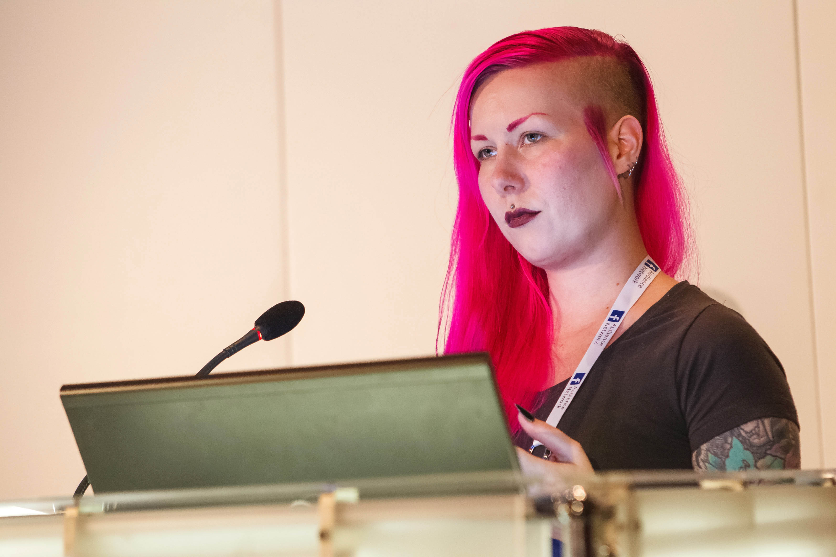 Speakers: Karoliina Korppoo (Game Designer, Colossal Order Ltd)